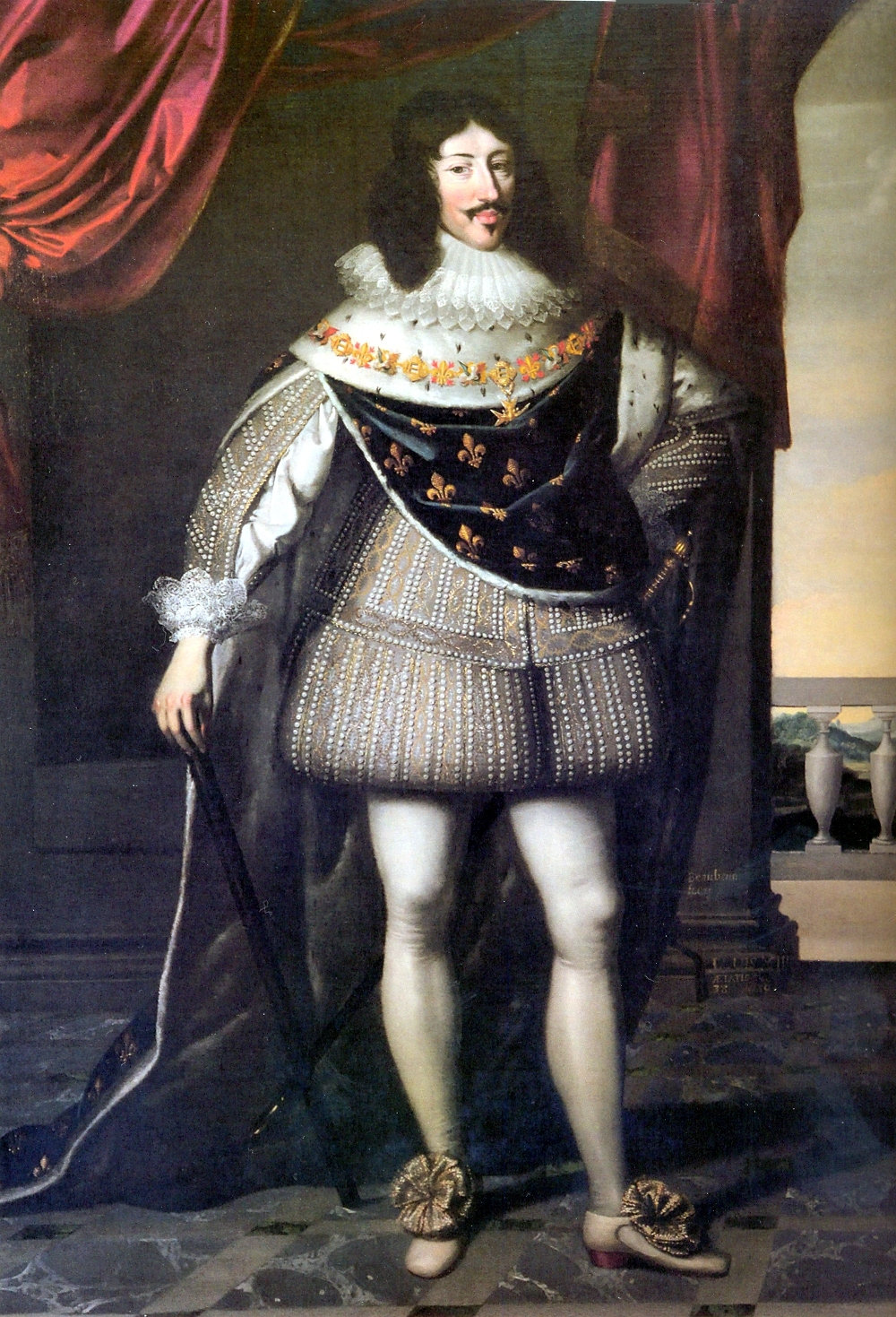 Louis XIII roi de France